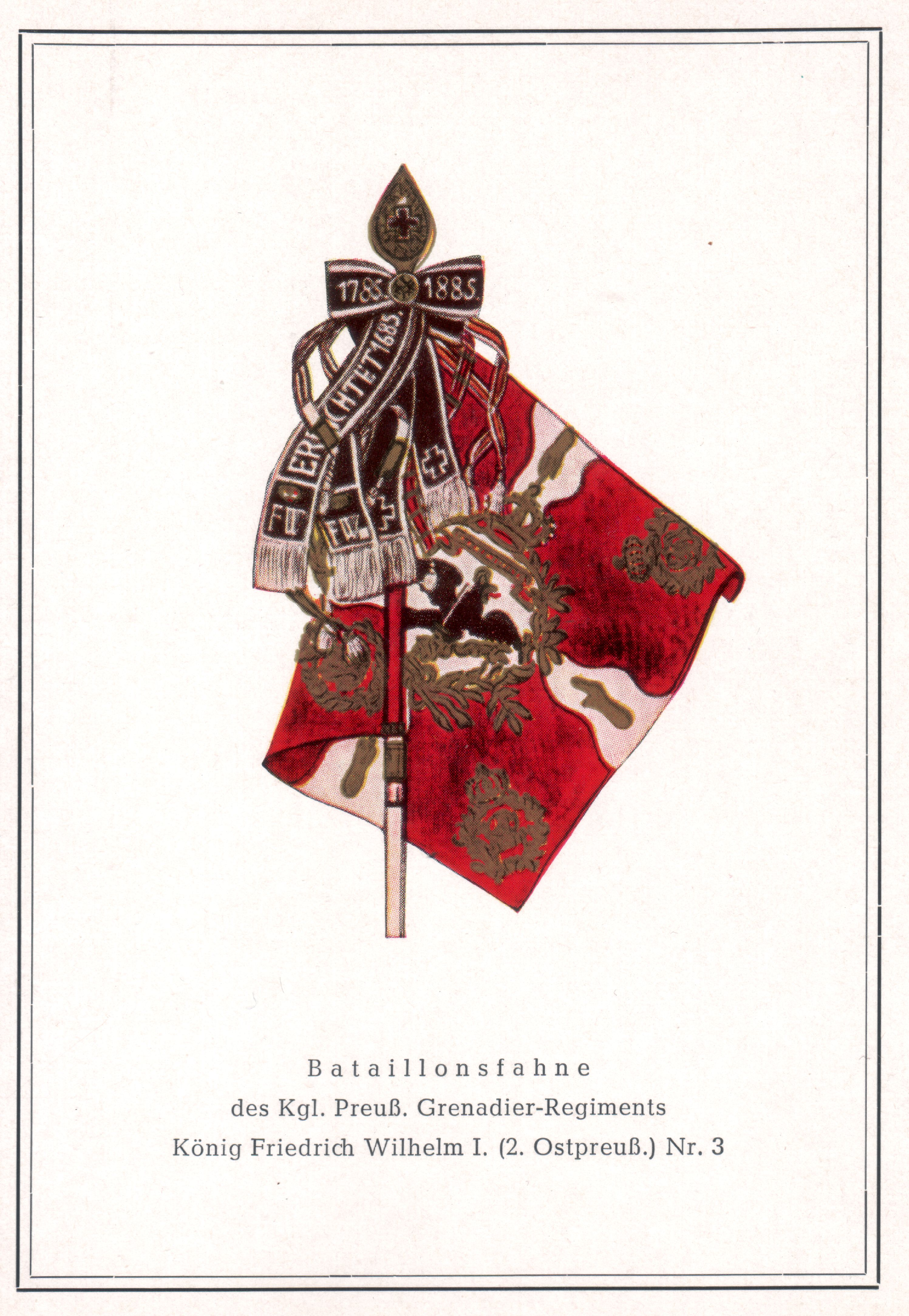 Regts-Stiftungstag 18.08.1685 - Garnison Königberg (Pr) Trad. Reichsheer: 1.,2.,3./1 (Pr) I.R.- Trad. Wehrmacht: I/I.R. 1 Stadtort Königsberg (Beschriftung der Postkarte auf der Hinterseite) Bataillonsfahne des Kgl. Preuß. Grenadier-Regiments König Friedrich Wilhelm I. (2. Ostpreuß.) Nr. 2 (Beschriftung der Vorderseite, nicht angegeben welches Bataillon (1.2. oder 3.) vom Regiment es sich hier handelt)